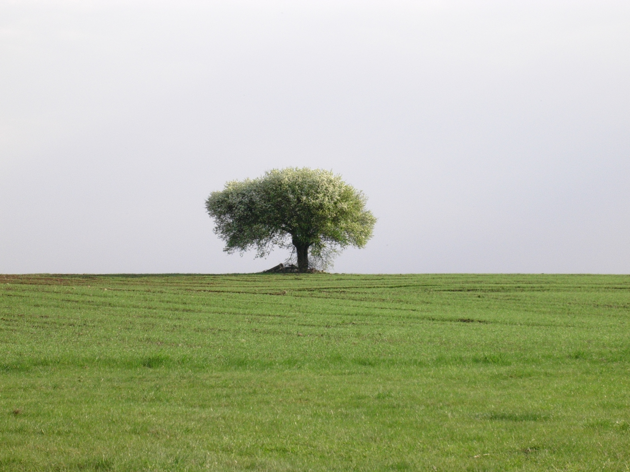 Drzewo na południe od drogi Mężenin - Białystok